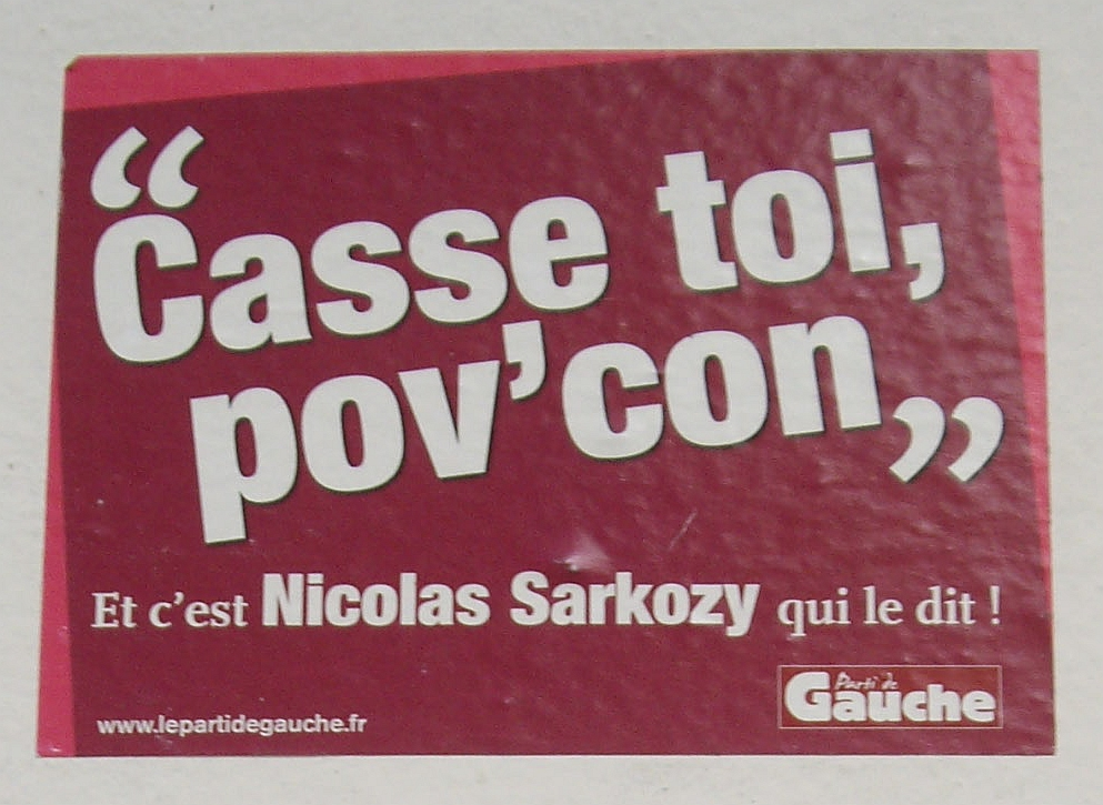 Affichette du Parti de gauche dans une rue de Paris : « "Casse-toi, pov'con." Et c'est Nicolas Sarkozy qui le dit ! »